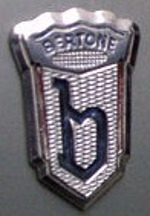 Quelle: selbst fotografiert, 06/2004 Fotograf: Späth Chr.